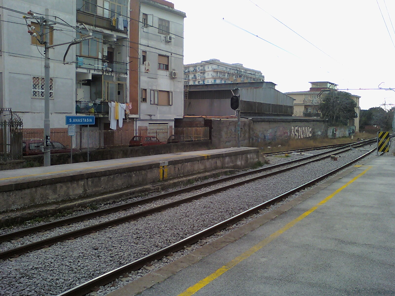 immagine di mia proprietà (Lusb)